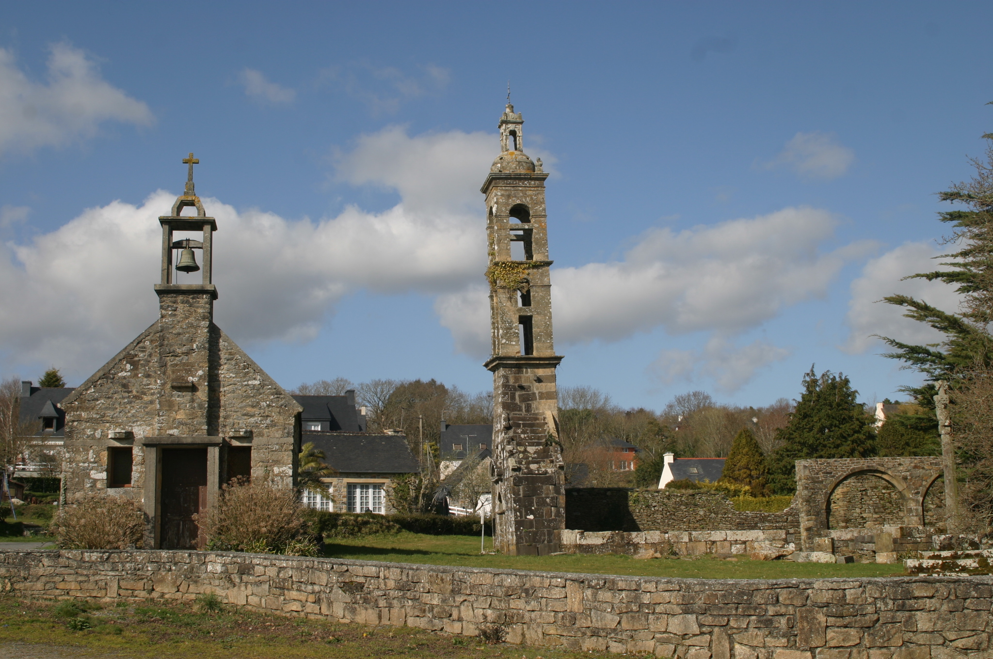 Chapelle de Lanvoy